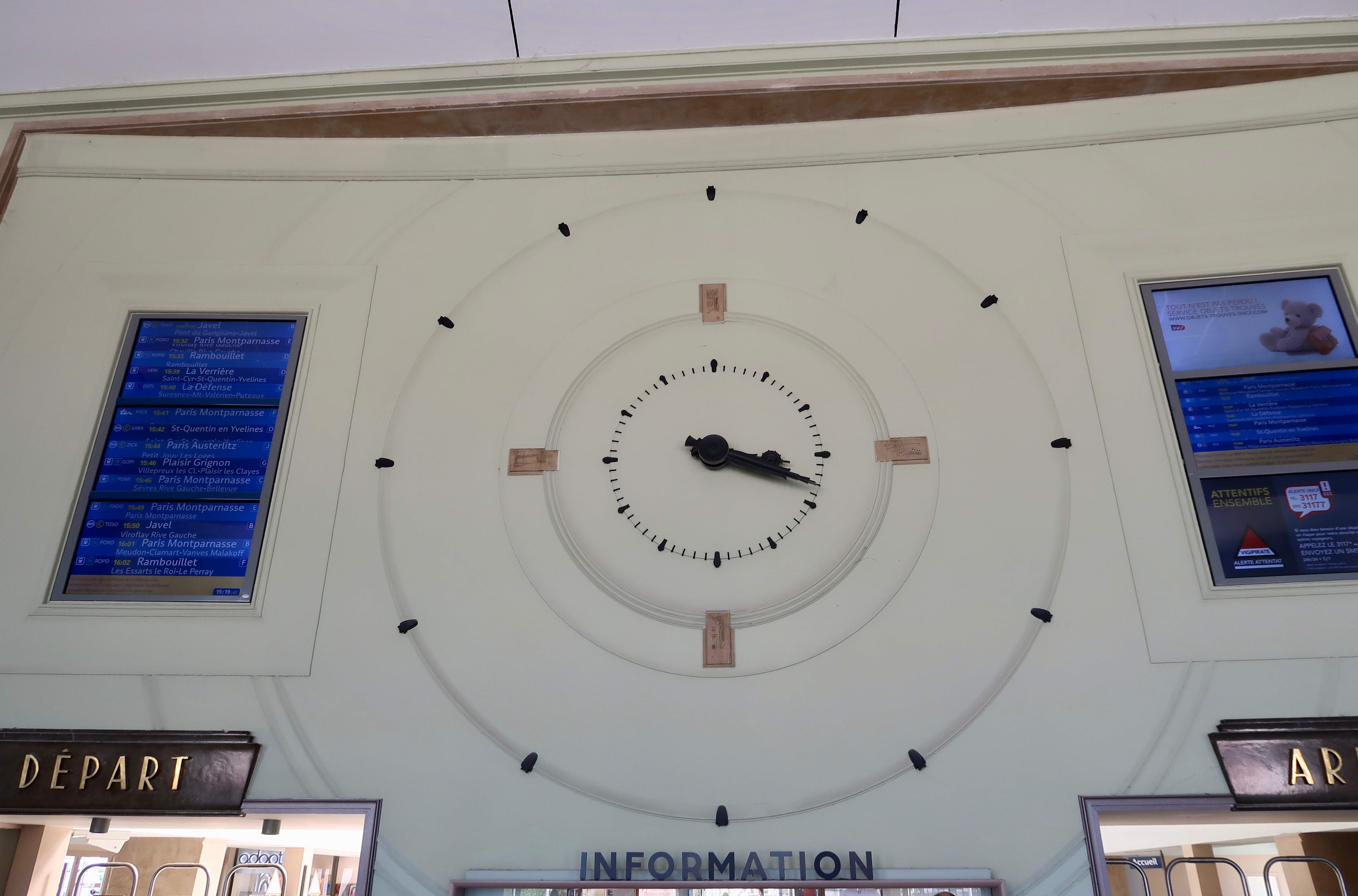 Horloge du premier hall de la gare de Versailles-Chantiers (Yvelines).